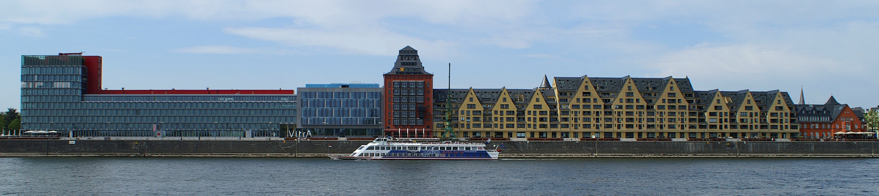 „Kölsches Siebengebirge“ und Neubauten auf dem Gelände des Rheinauhafens. Gebäude von links nach rechts: Kap am Südkai, ECR Offices, Silo 23, Siebengebirge, Rheinkontor. Im Vordergrund die MS Drachenfels der Köln-Düsseldorfer.